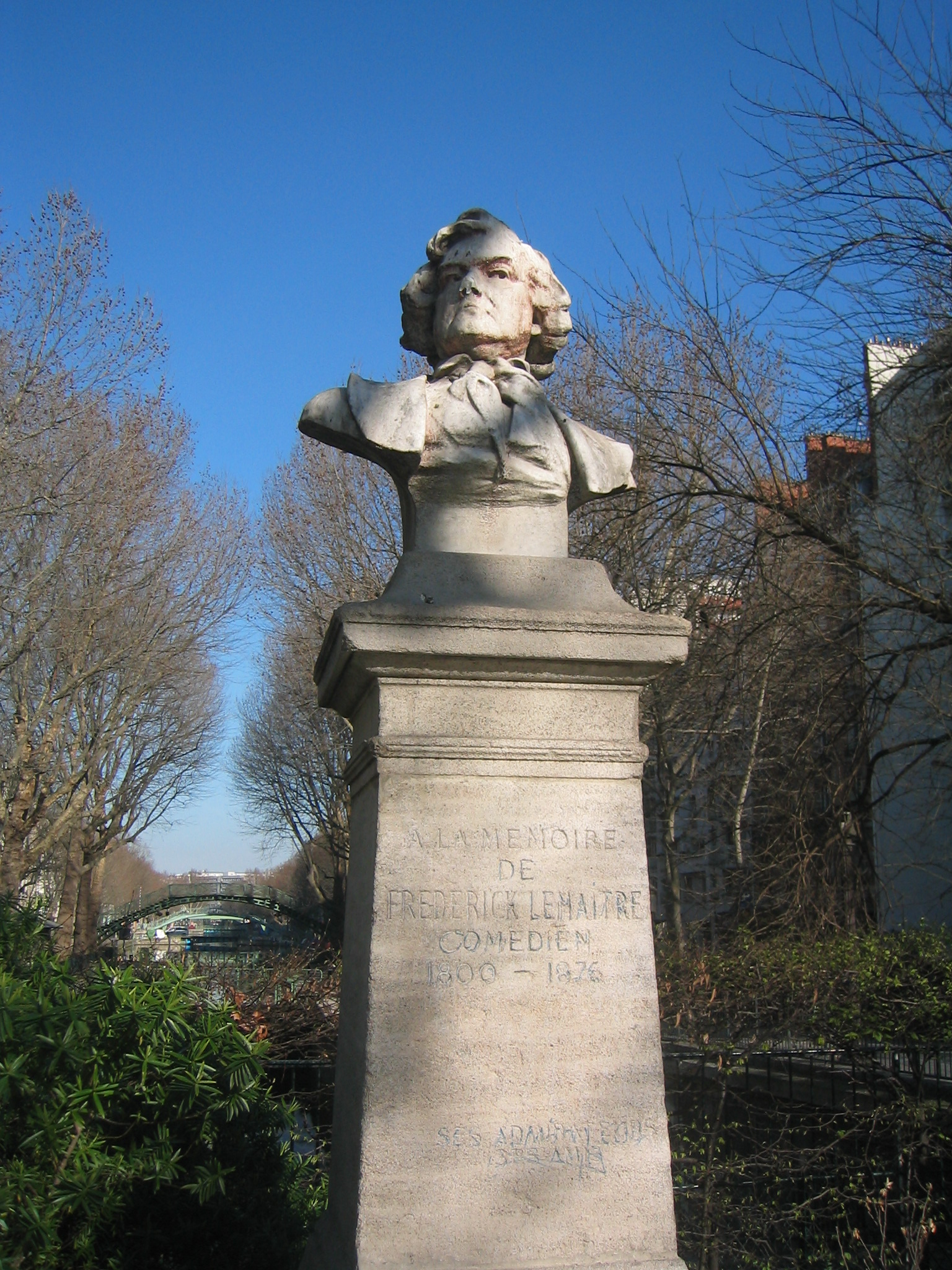 Buste de Frédérick Lemaître à Paris